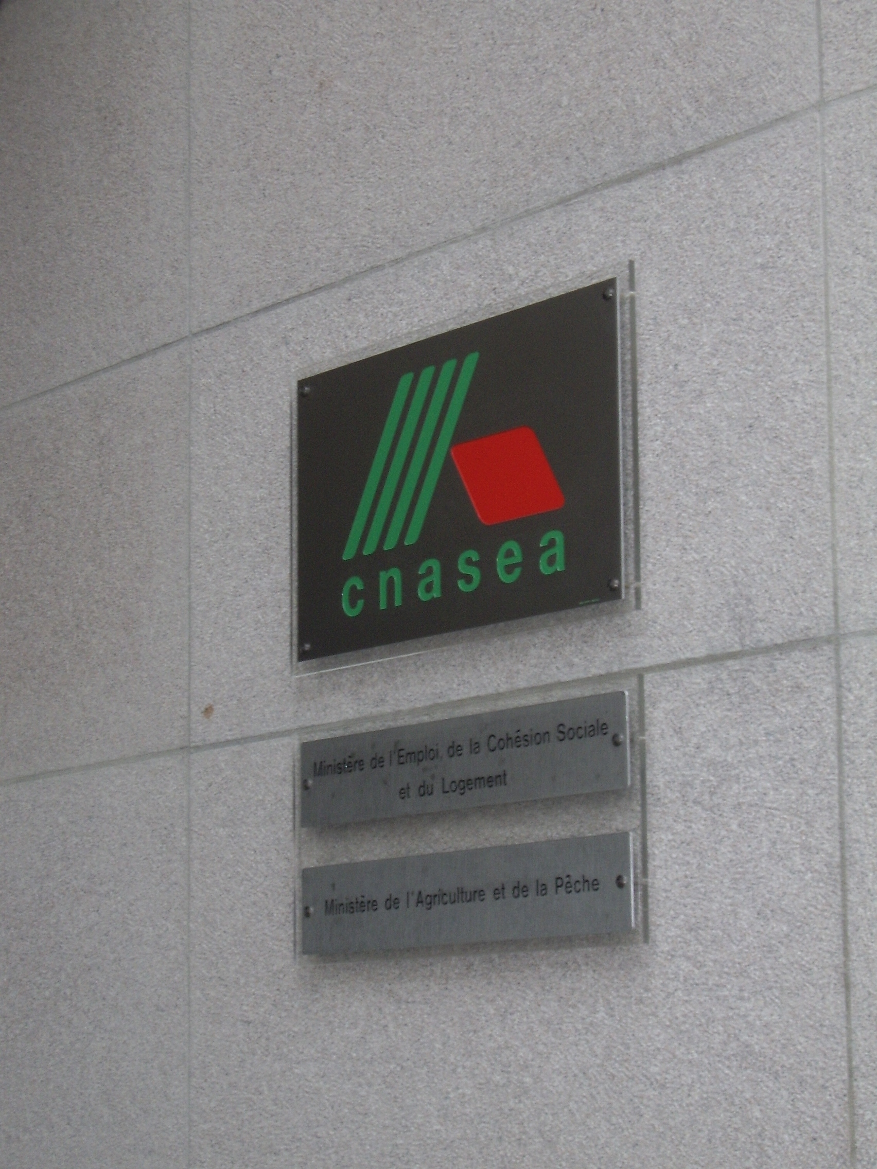 Logo à l'entrée du CNASEA, Limoges, angle rue du Maupas